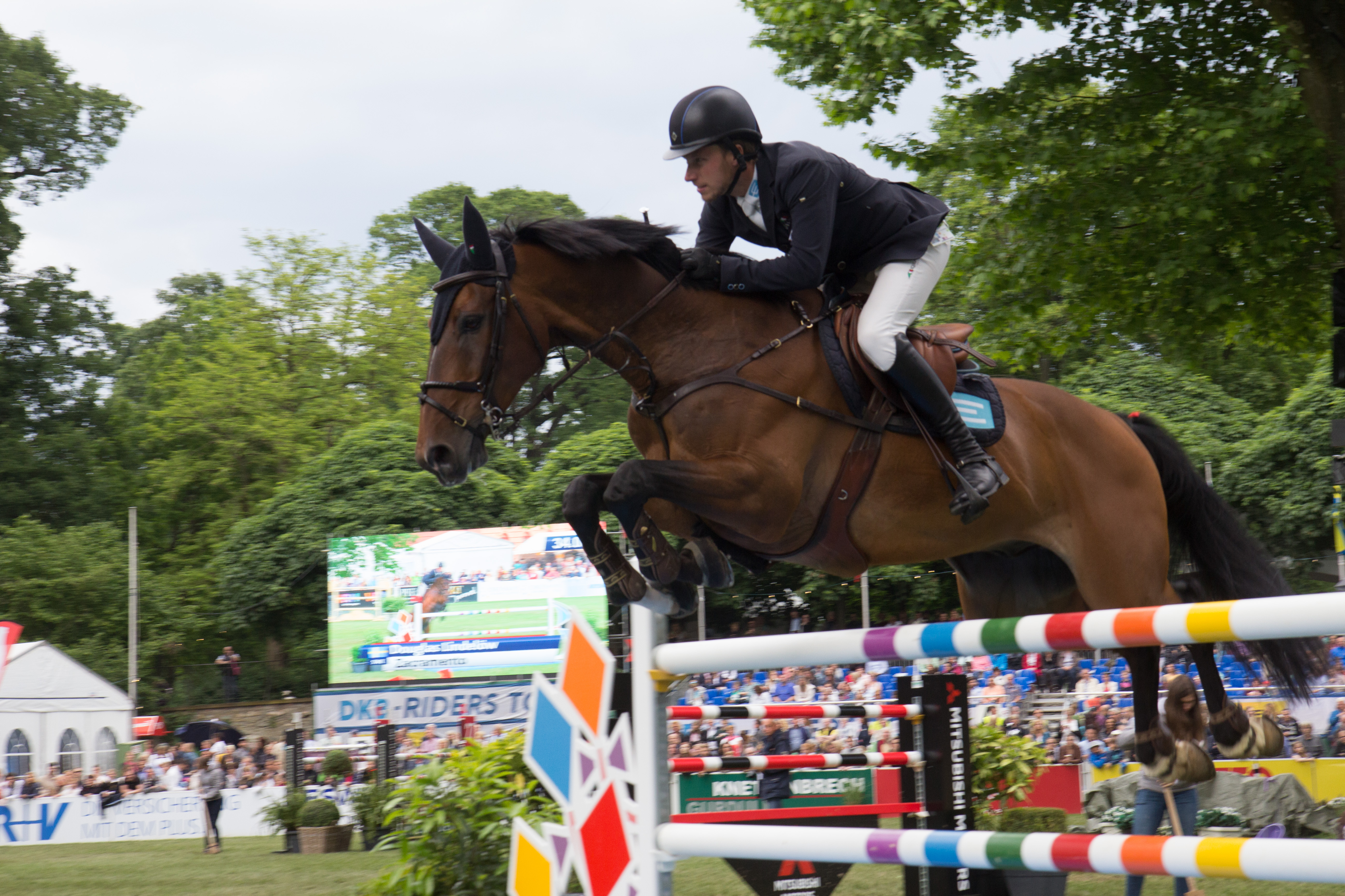 Internationales Wiesbadener Pfingstturnier 2018. CSI 4* Springprüfung KI.S *** m. Stechen (1,50m) "Preis des Hessischen Ministerpräsidenten": Douglas Lindelöw auf Zacramento